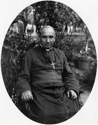 Biskup Paweł Kubicki